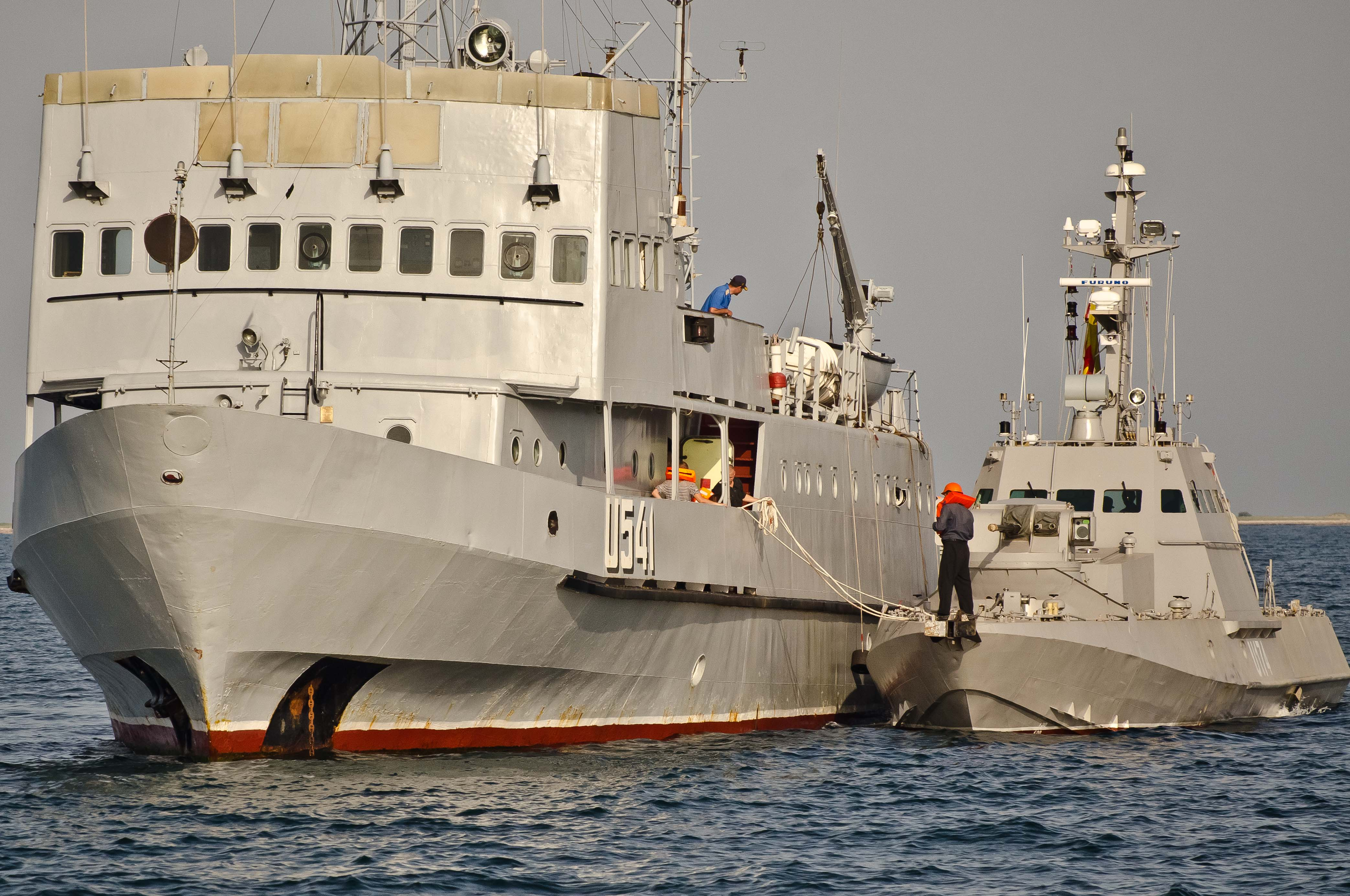 Швидкий хід та потужна зброя бронекатеру "Аккерман" (U-175) ) - запорука оборони узбережжя Маріуполя. Державні іспити та ходові випробування в морі тривають. Два новозбудовані для Військово-Морських Сил Збройних Сил України малі броньовані артилерійські катери в ході випробувань у відкритому морі здійснили спільне плавання. Під час виходу у складі тактичної групи катерів перевірено роботу систем і механізмів у штормових умовах. Матеріальна частина працювала в штатному режимі. Фото: Євген Силкін